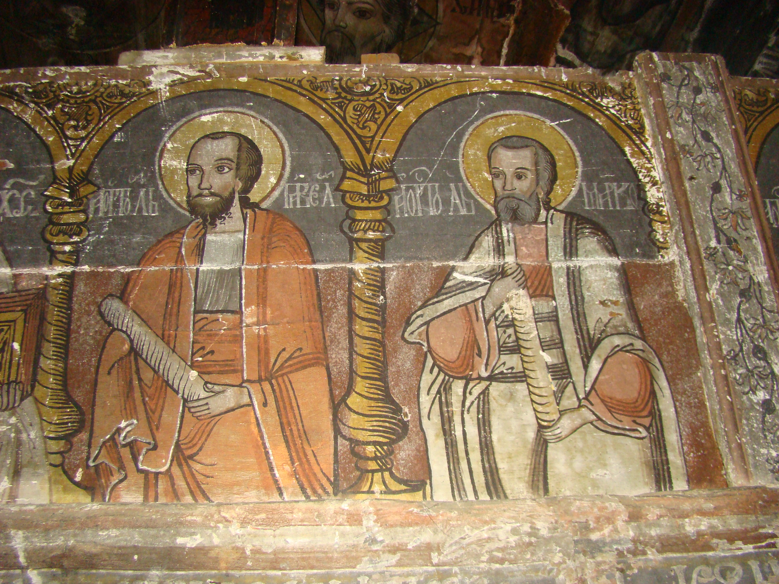 Biserica de lemn „Cuvioasa Paraschiva” din Pianu de Sus, județul Alba